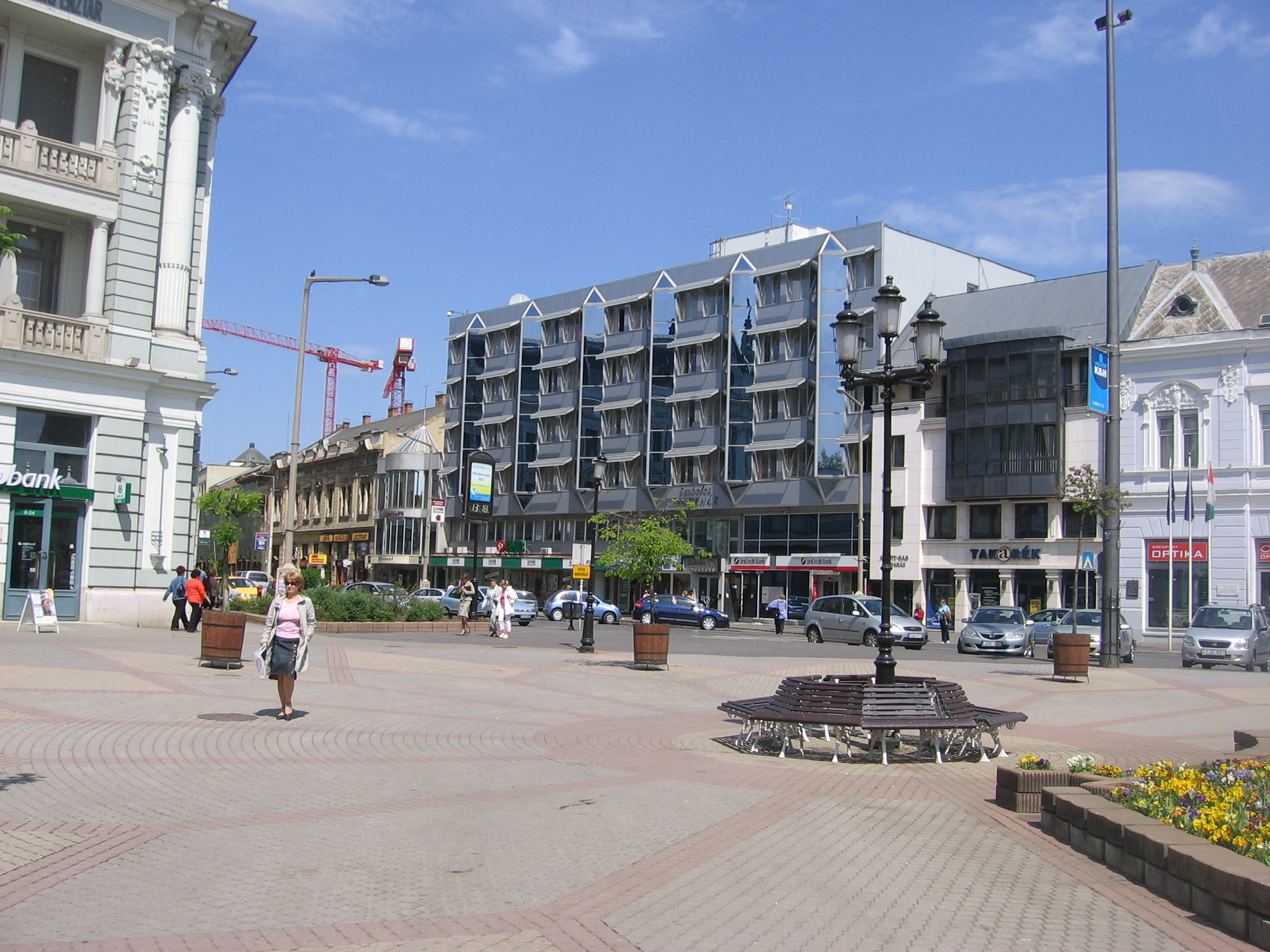 Main suare (Kossuth ter? - I'm not sure) in Nyíregyháza Główny plac (Kossuth ter?) Nyíregyháza